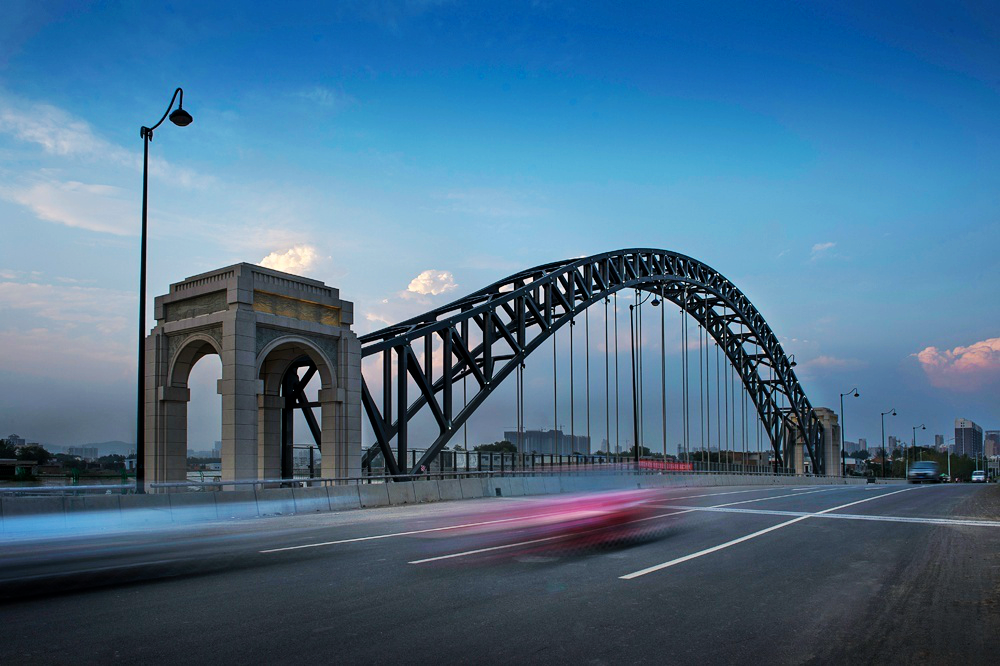 去焦作扫描